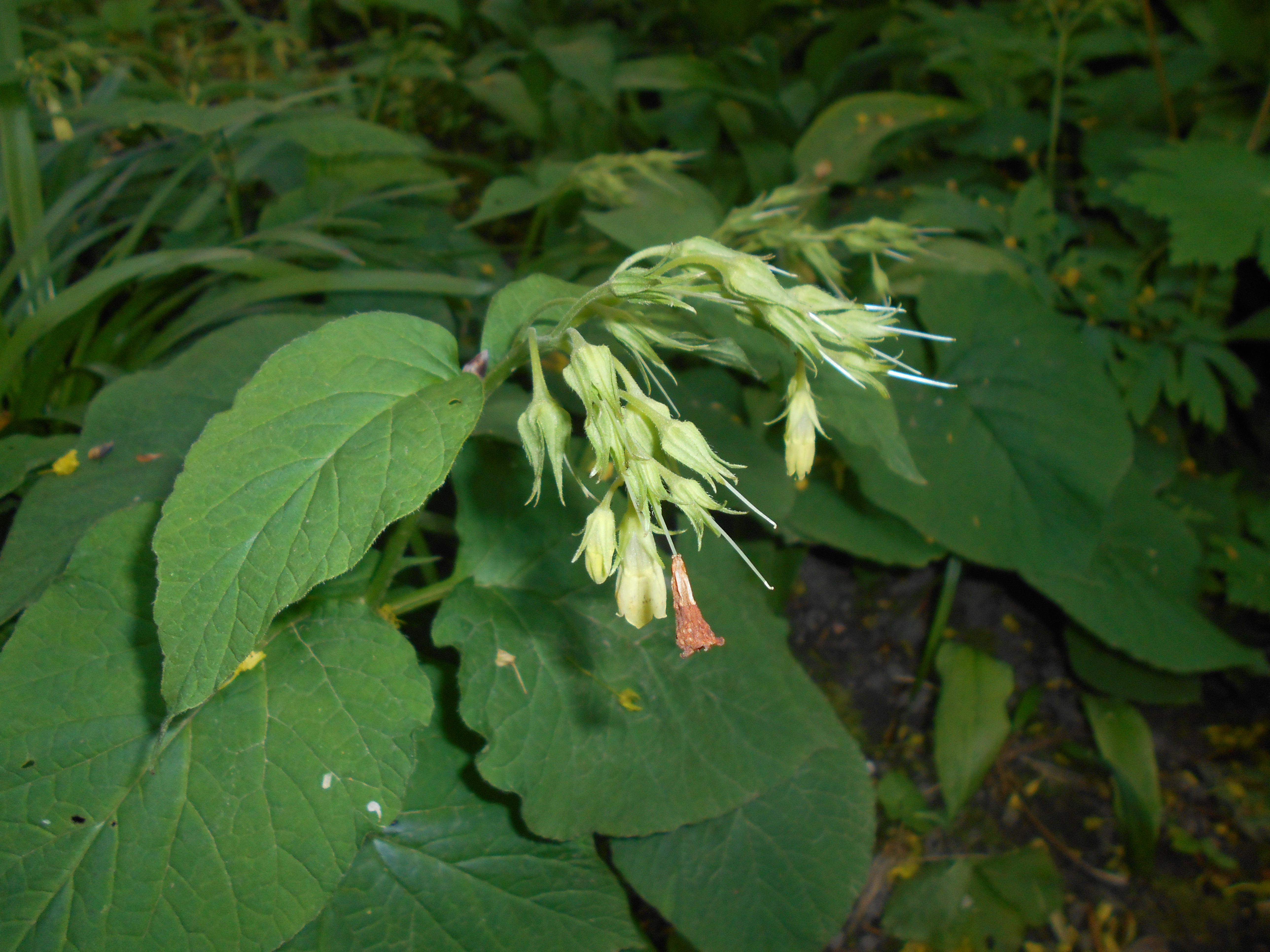 Żywokost sercowaty (Symphytum cordatum), Ogród Botaniczny UMCS w Lublinie